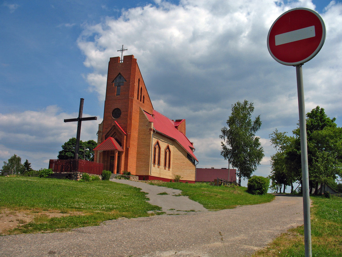 Сhurch of St. John in Volma